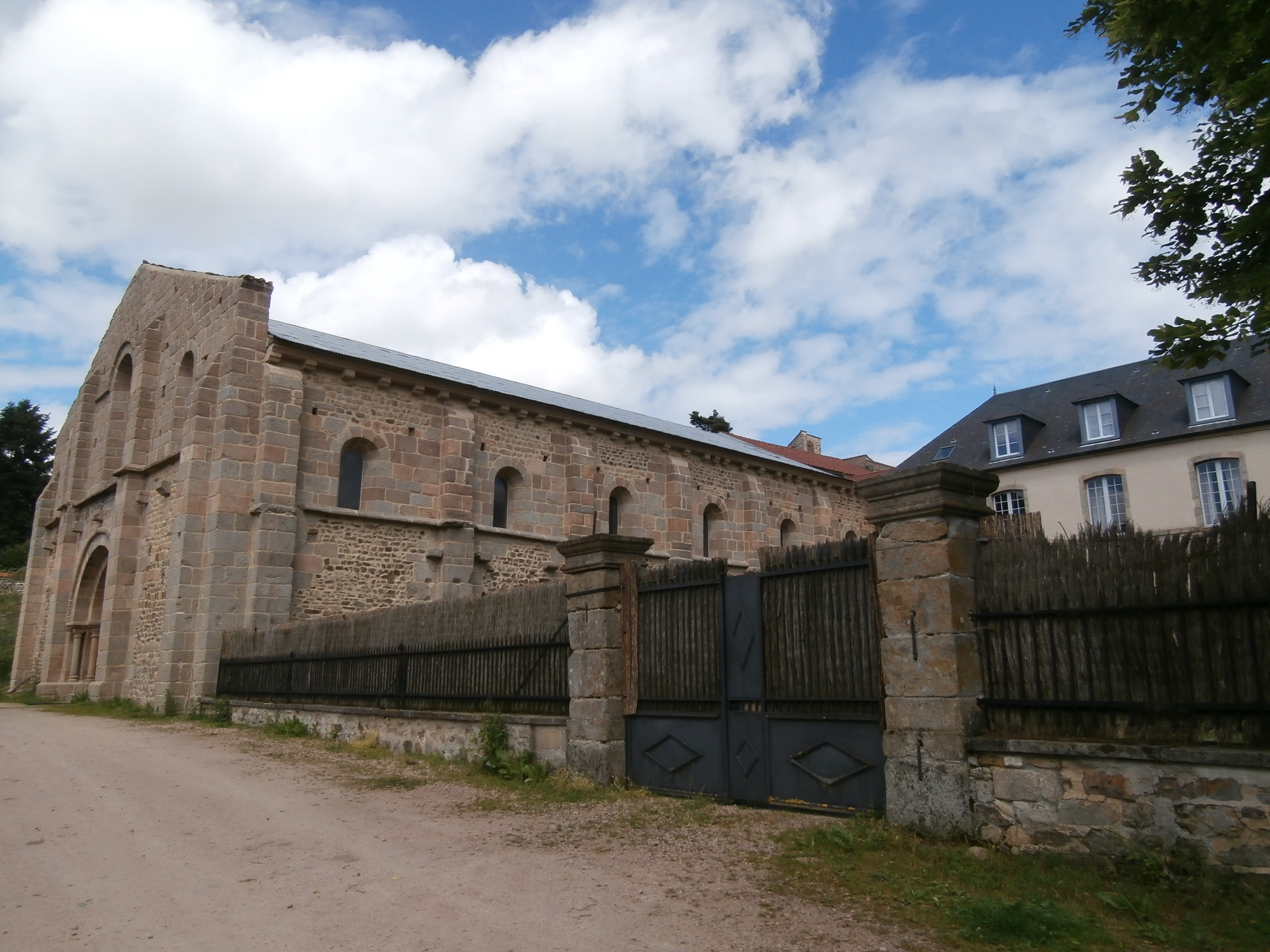 Abbaye Notre-Dame de Bellaigue, à Virlet (Puy-de-Dôme)